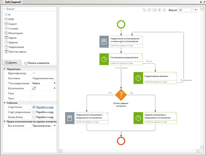 Конструирование бизнес-процессов в системе Directum без программирования